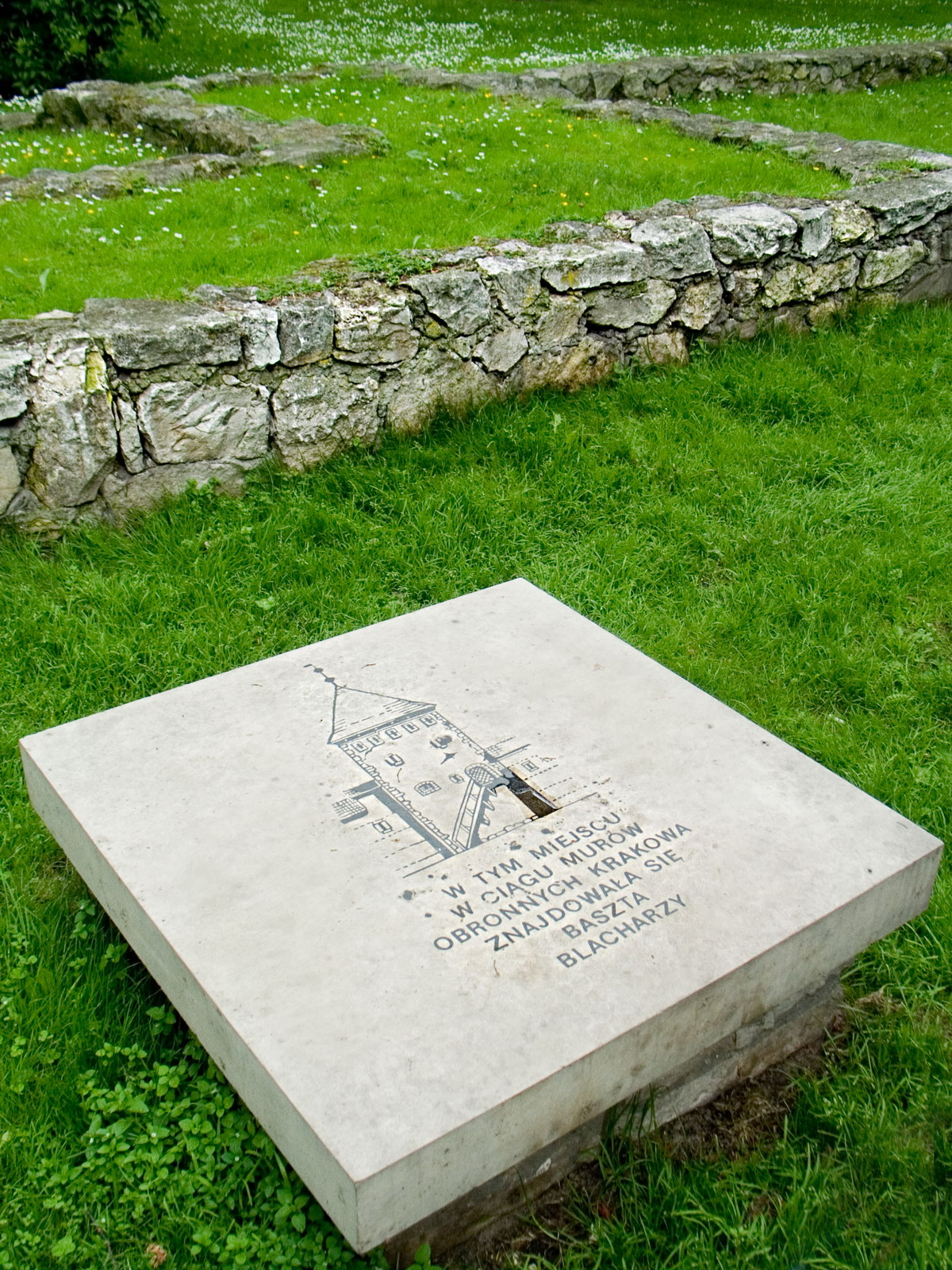 Tablica upamiętniająca Basztę Blacharzy na Plantach w Krako